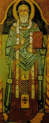 Święty Dioskoros, koptyjski fresk z XIII wieku w klasztorze świętego Antoniego w Egipcie.